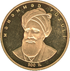 Məhəmməd Füzulinin xatirəsinə həsr olunmuş qızıl sikkə